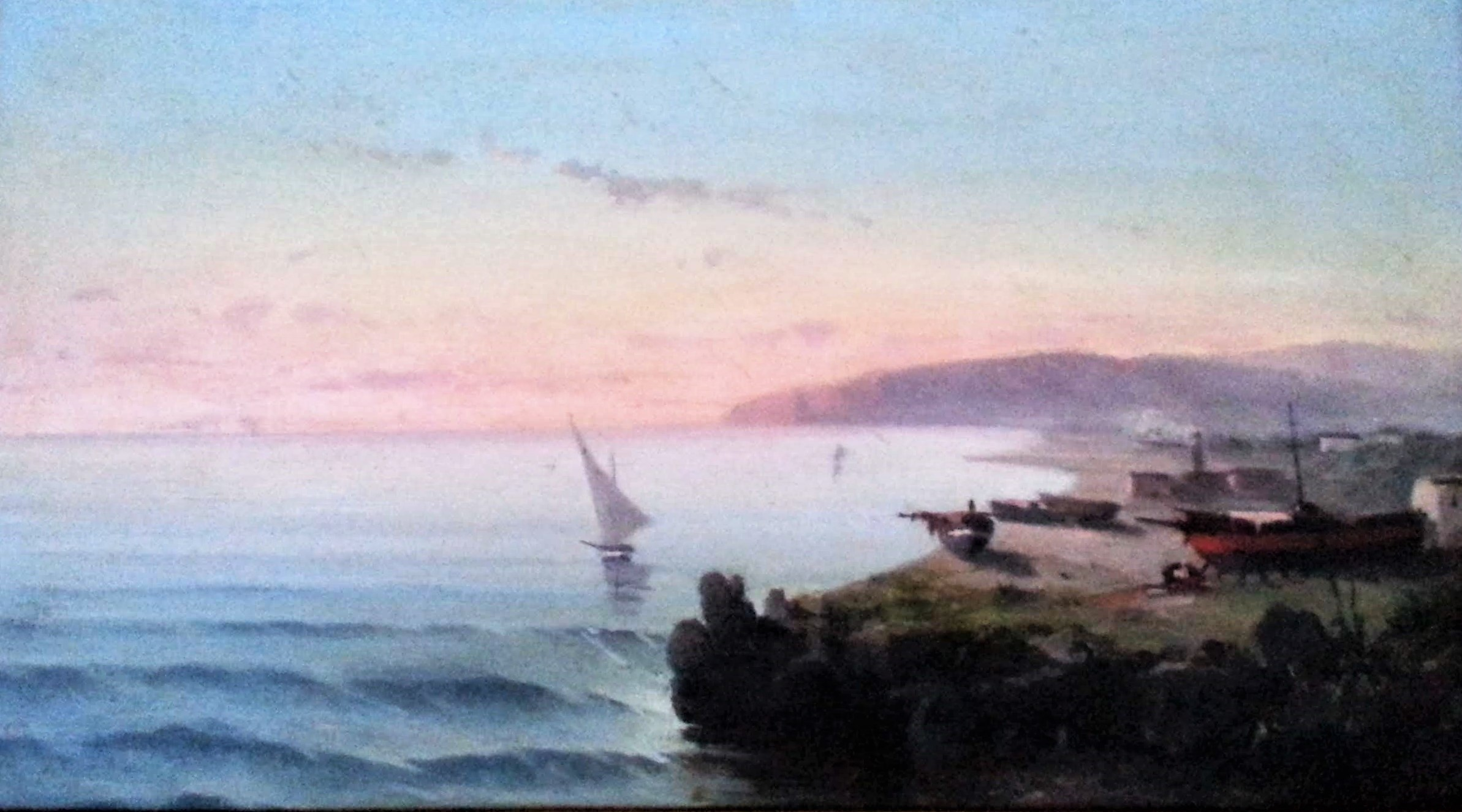 Paesaggio Dipinto Olio su tela Firmato in basso a destra E.Papa